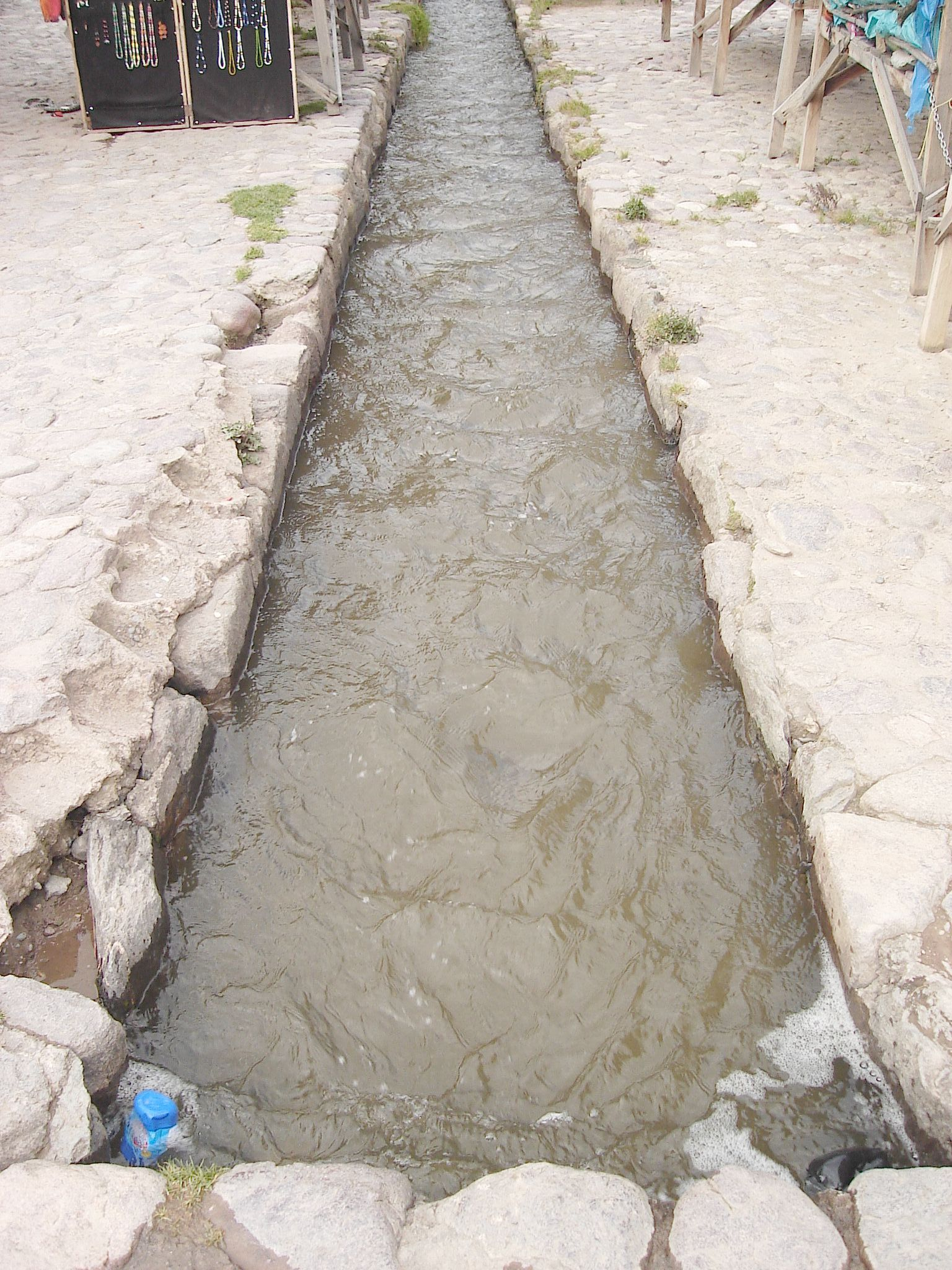 Foto tirada por mim, em Ollantaytambo.